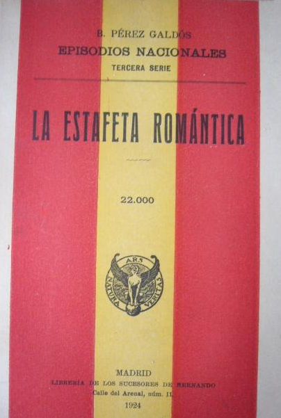 La estafeta romántica de Benito Pérez Galdós (Madrid: Sucesores de Hernando, 1924)